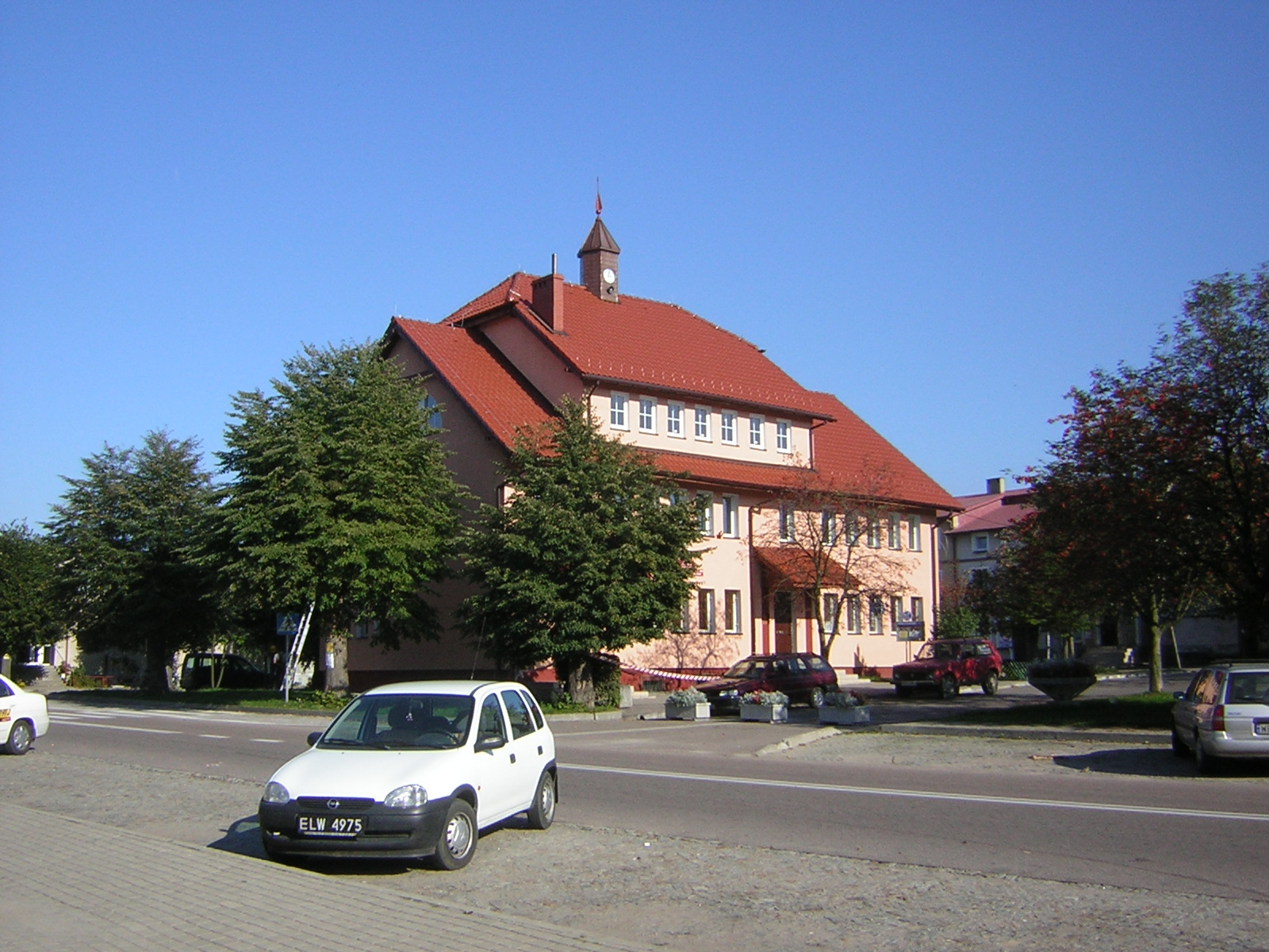 Urząd gminy w Dąbrównie